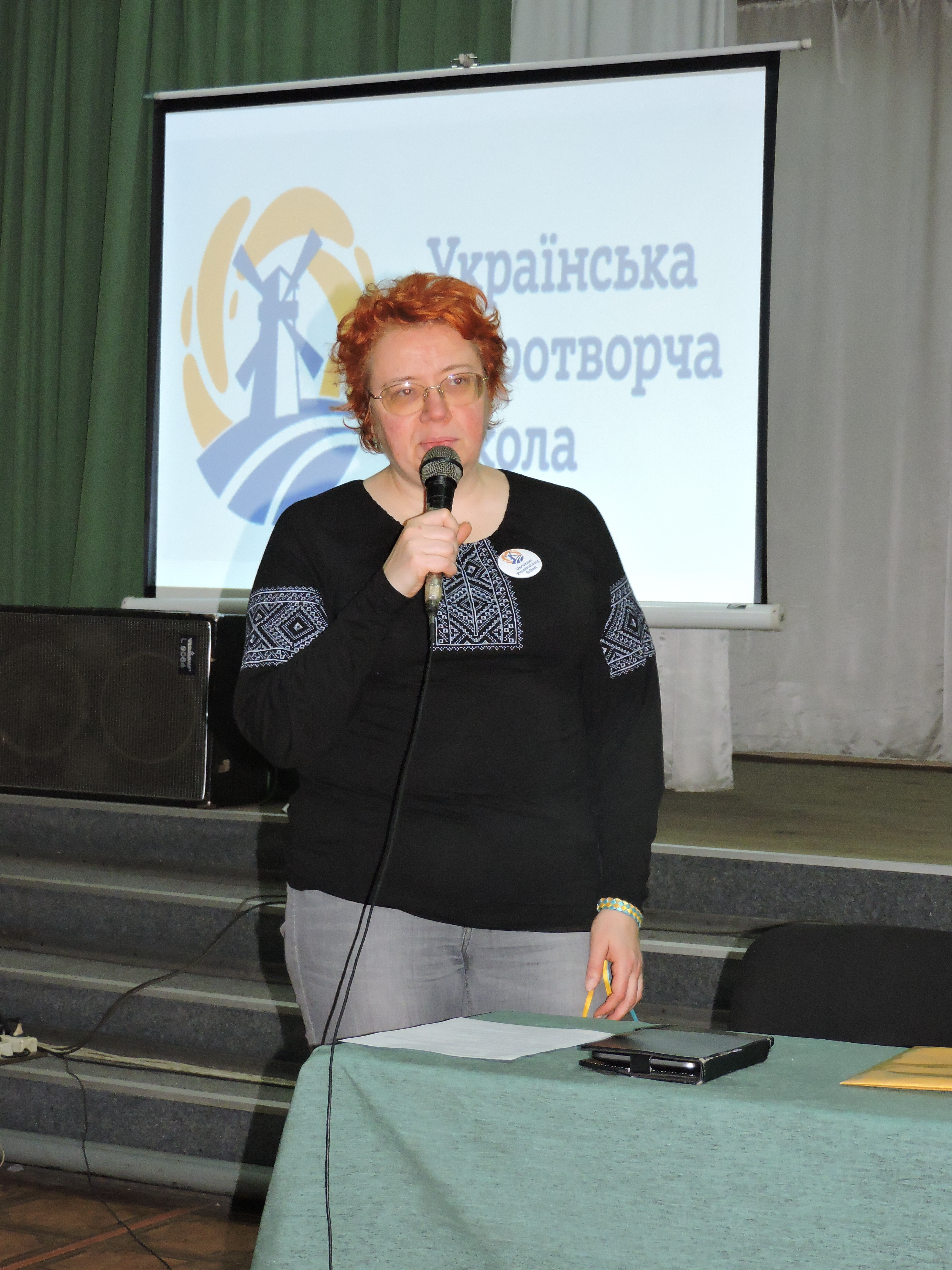 Наталія Зубар під час науково-практичної конференції «Місцеве самоврядування на Донбасі: історія, проблеми та перспективи розвитку як невід’ємної складової місцевого самоврядування України», проведена в рамках «Української миротворчої школи»м. Красноармійськ, 20 березня 2015 року.